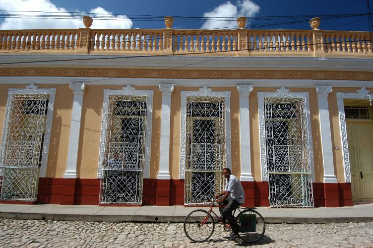 Trinidad, Cuba.